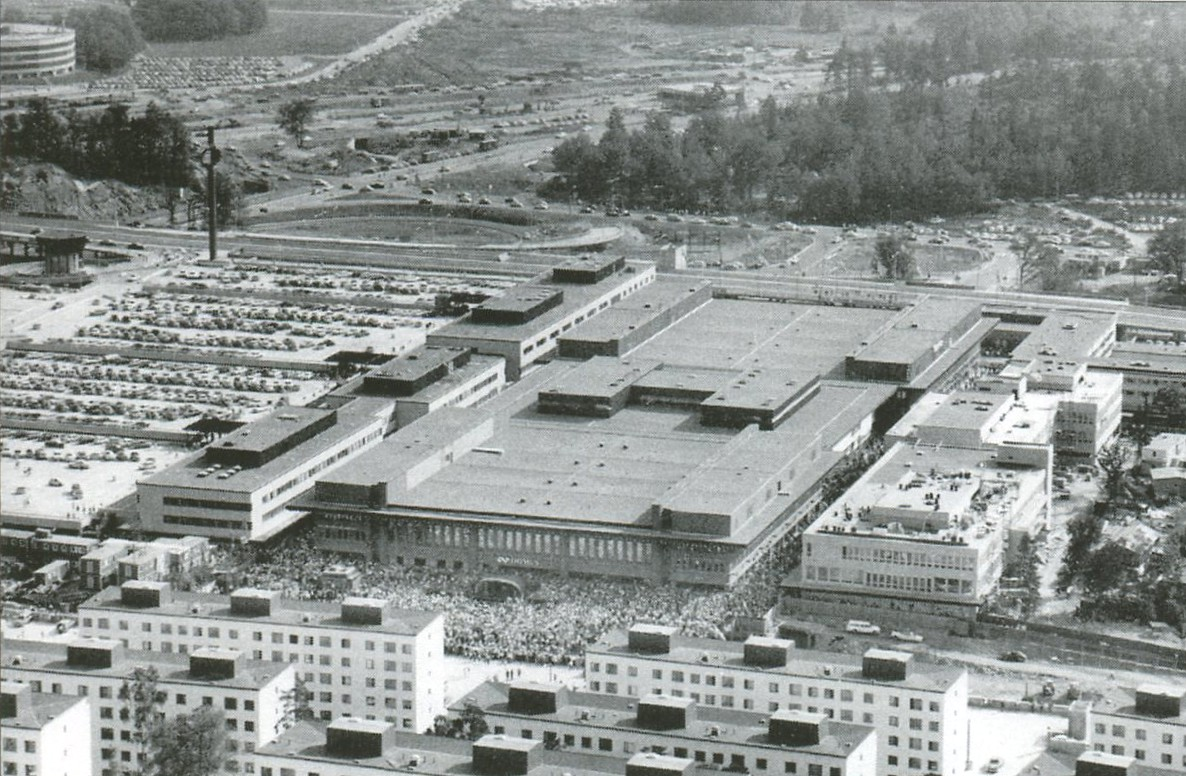 Invigning av Skärholmen